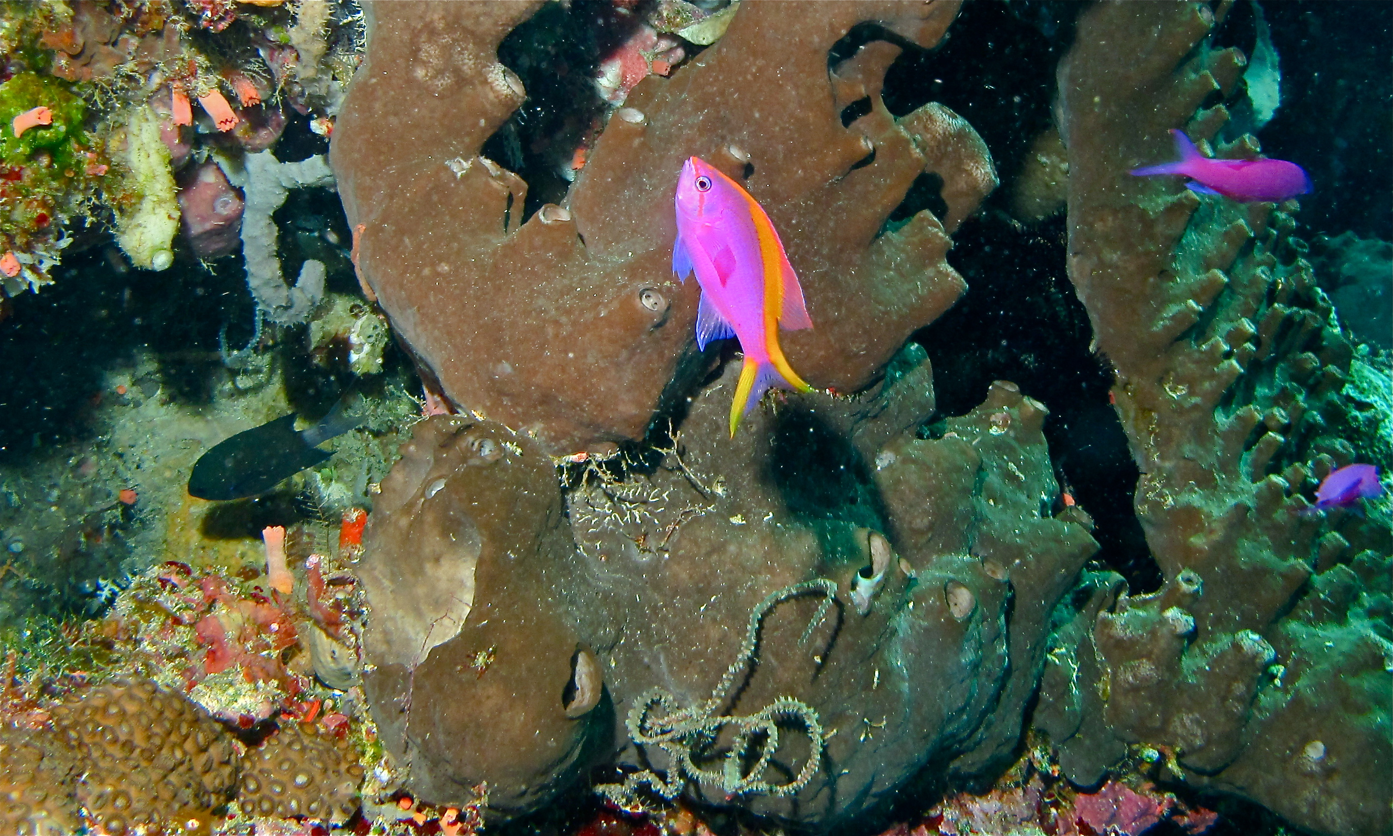 Negeri, Bunaken Island, Sulawesi, INDONESIA